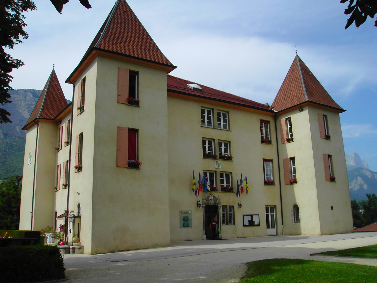 Château de Miribel - Mairie de Montbonnot-Saint-Martin